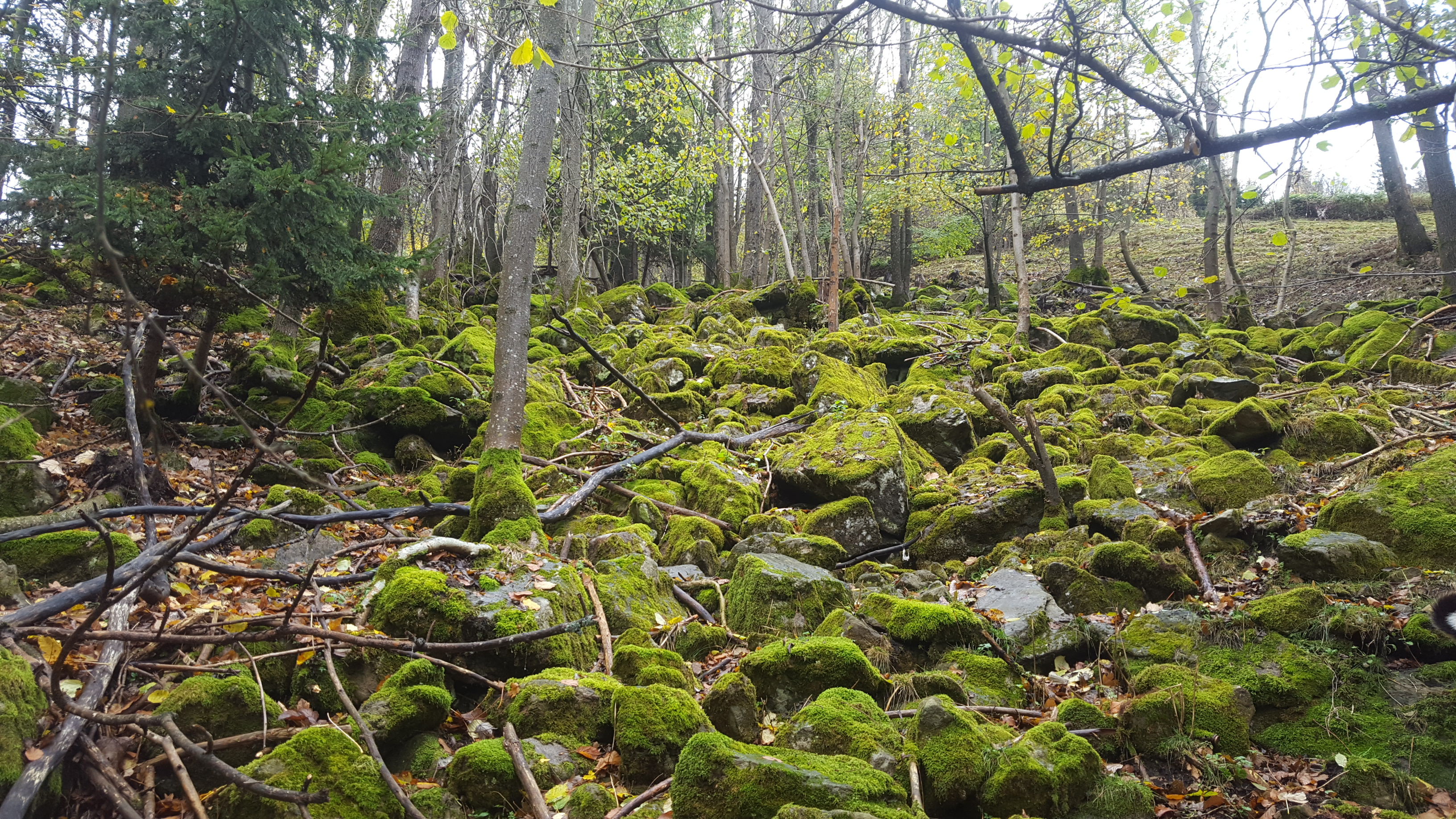 Kamniti plaz v Podlomu